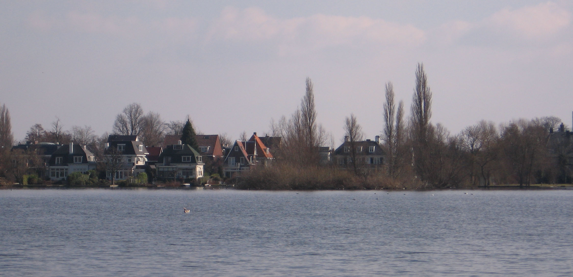 View on Hillegersberg, Rotterdam . Seen from Schiebroek